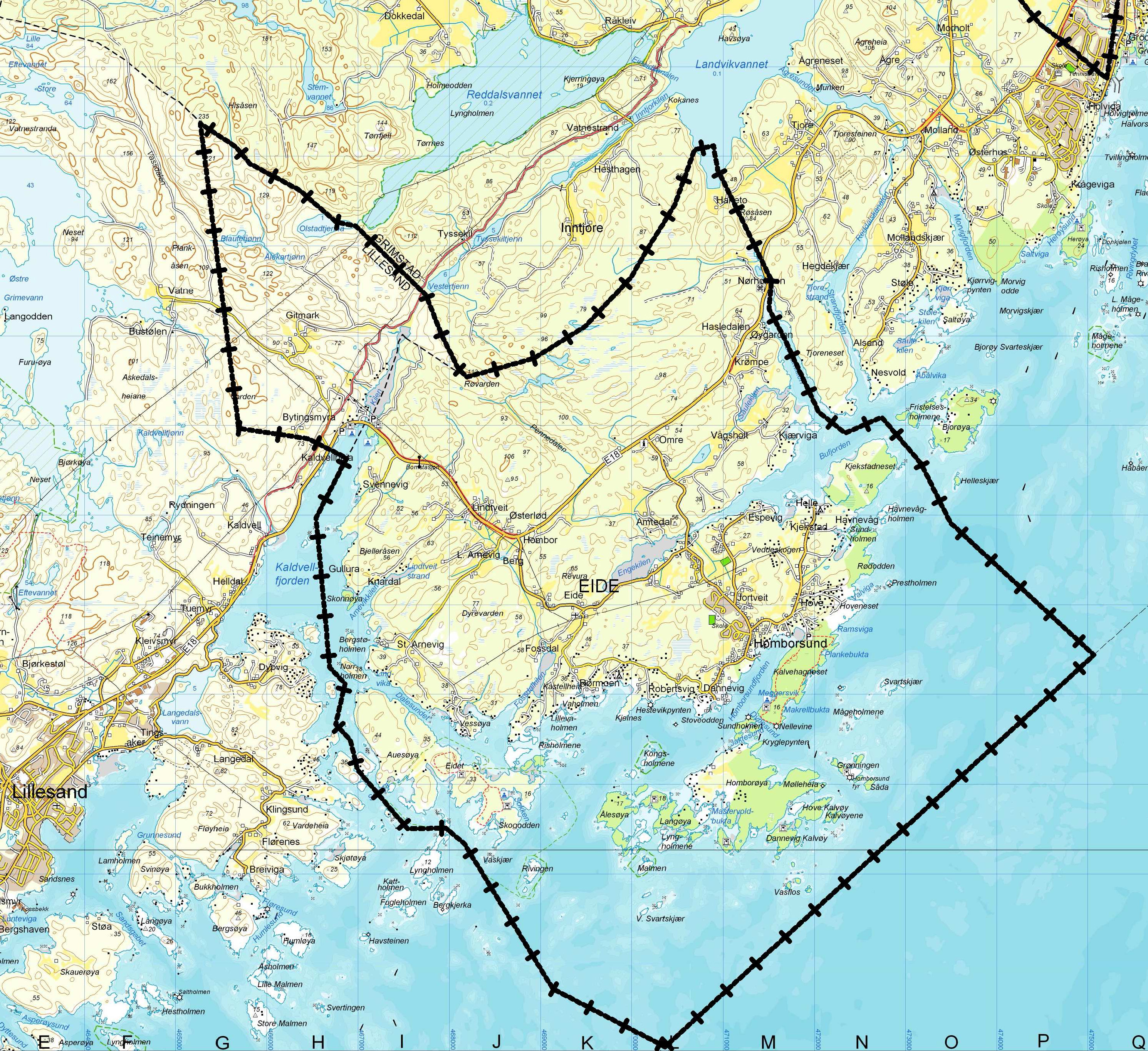 Kart over Eide kommune, Aust-Agder. 1960